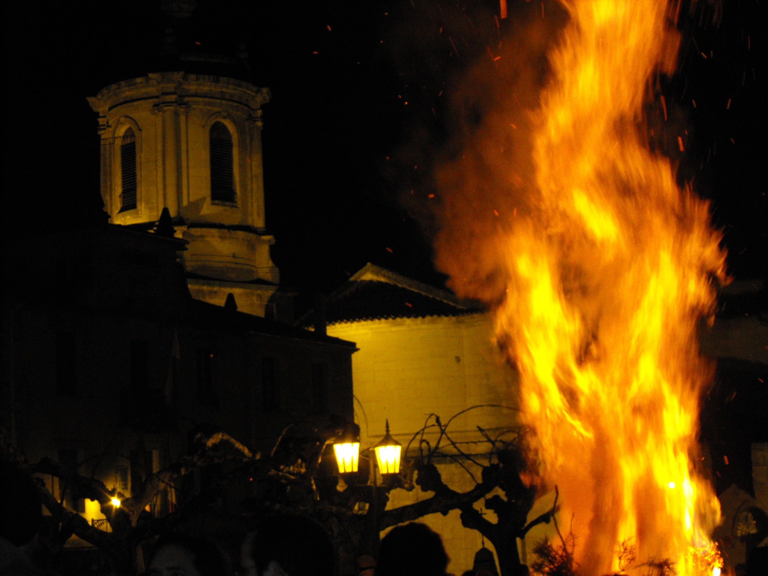 La fiesta de los Jefes, en Santo Domingo de Silos (Burgos), rememora las hogueras que en tiempo de la ocupación francesa, hicieras los habitantes del lugar para dar la apariencia al enemigo de que estaba el pueblo entero ardiendo, y no valía la pena entrar, al fondo a la izquierda la torre de la iglesia del Monasterio.